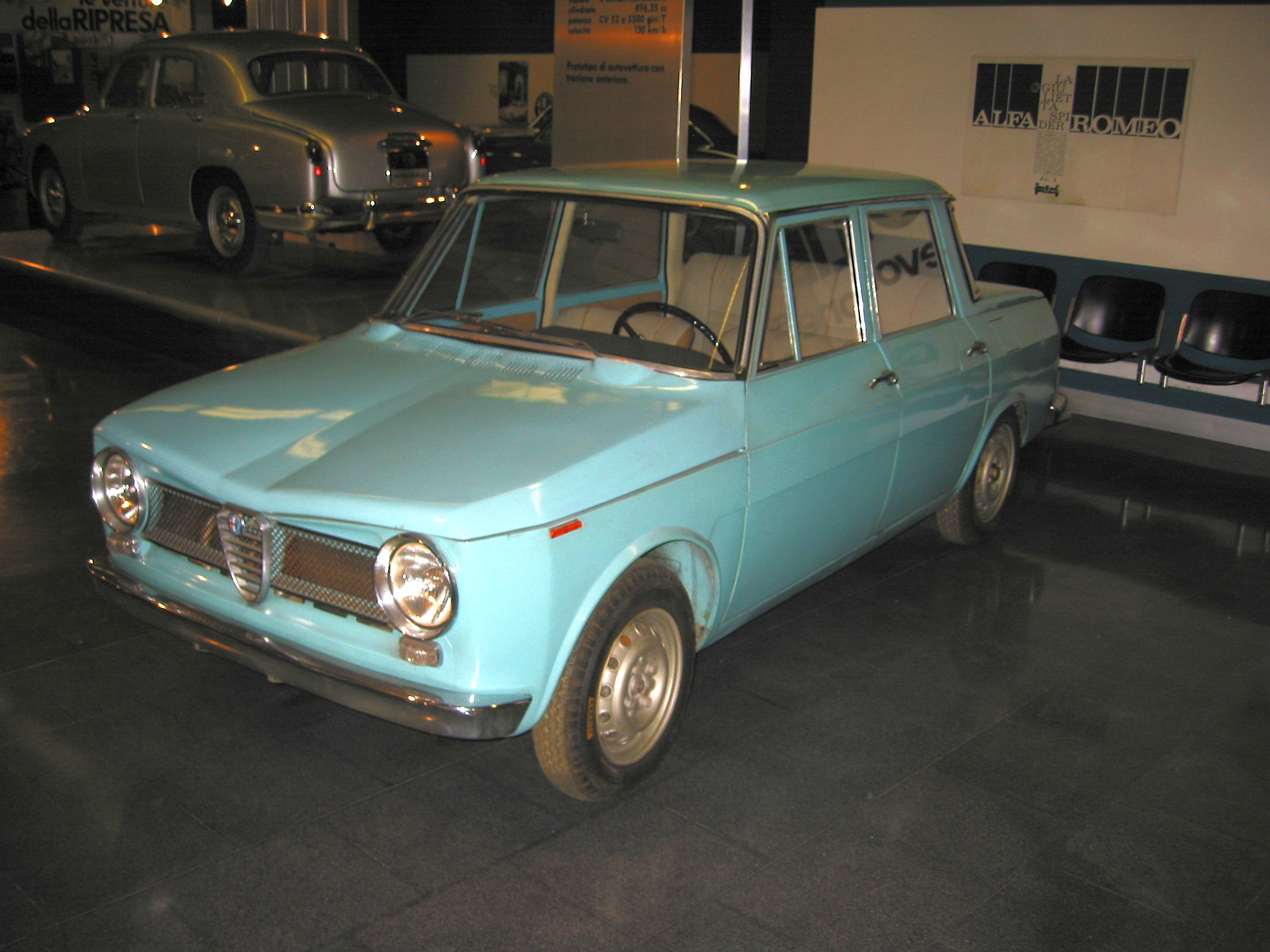 Alfa Romeo 103 von 1954